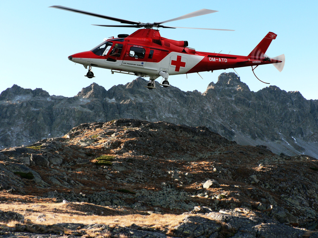 Ahusta A109K2 Vysoké Tatry - Slovakia